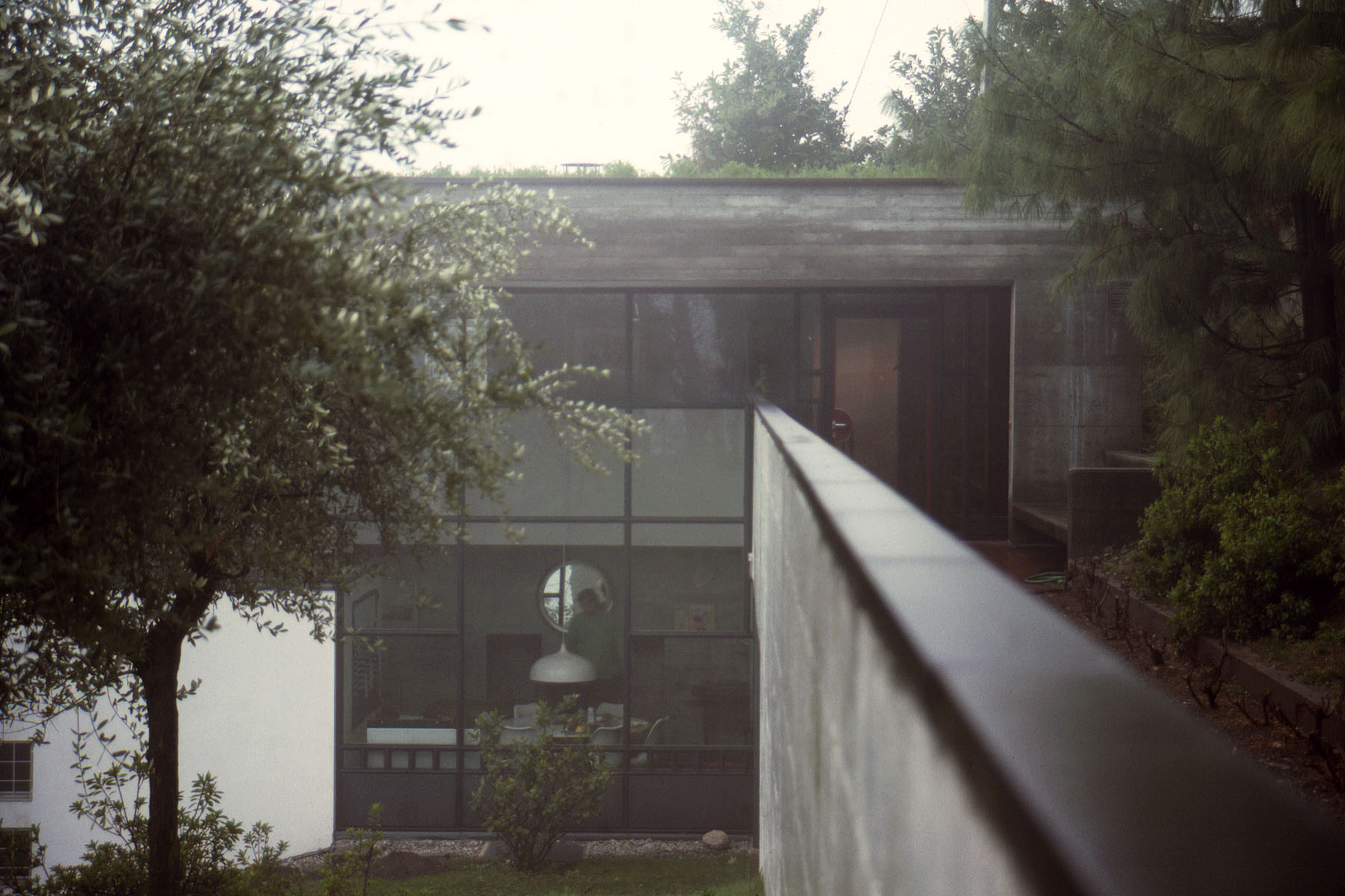 Locarno Monti, Casa Bianchetti, arch. Luigi Snozzi 1975-1977